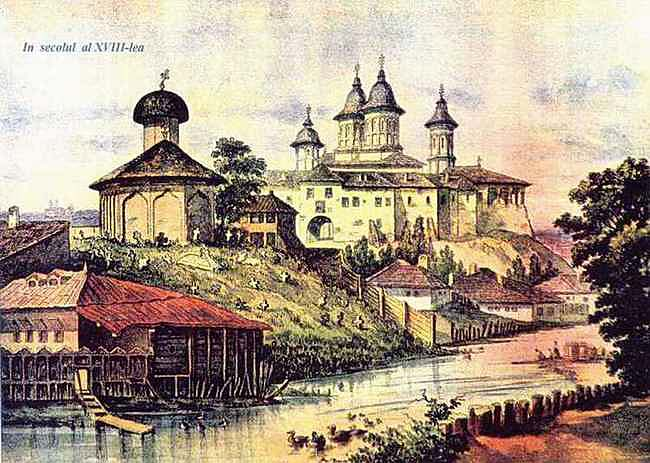 Mănăstirea Mihai Vodă - Aceasat imagine ste de fapt o litografie in care ste reprezentata Biserica lui Bucur in prim plan si in plan secund manastirea Radu Voda